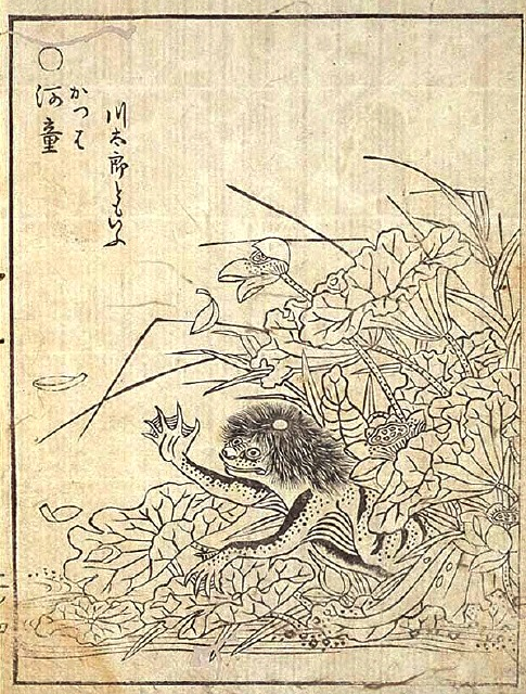 A kappa mythical japanese figure